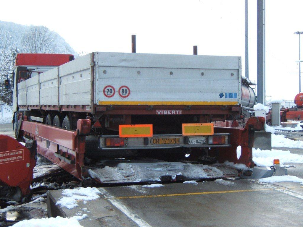 Système, train et wagon Modalohr, plateforme d'Aiton, Savoie, France